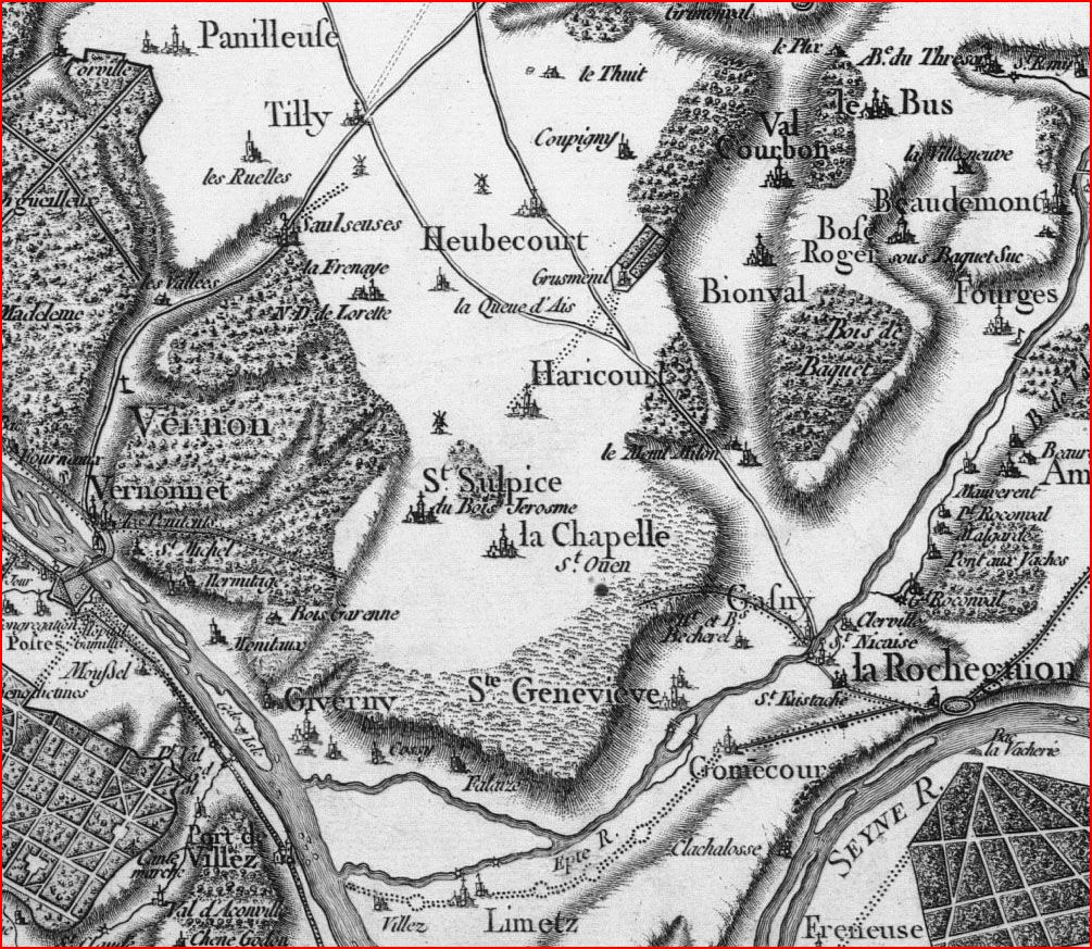 Carte de Cassini de la région de Gasny